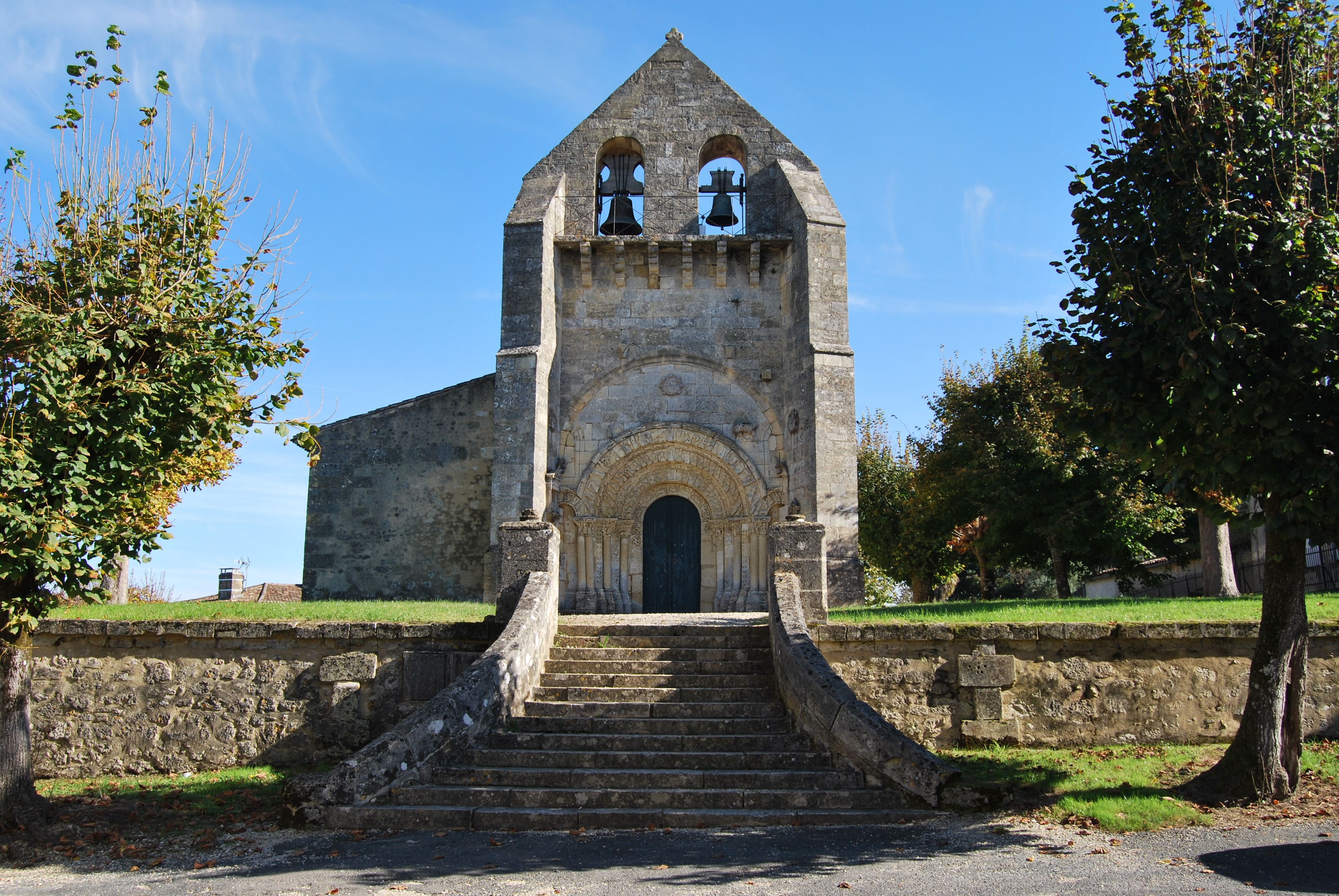 Église Saint-Martin de Haux